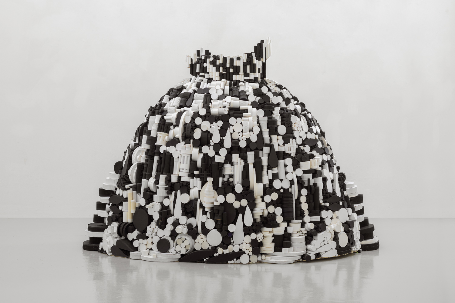 עבודה של האמנית נגה יודקוביק-עציוני